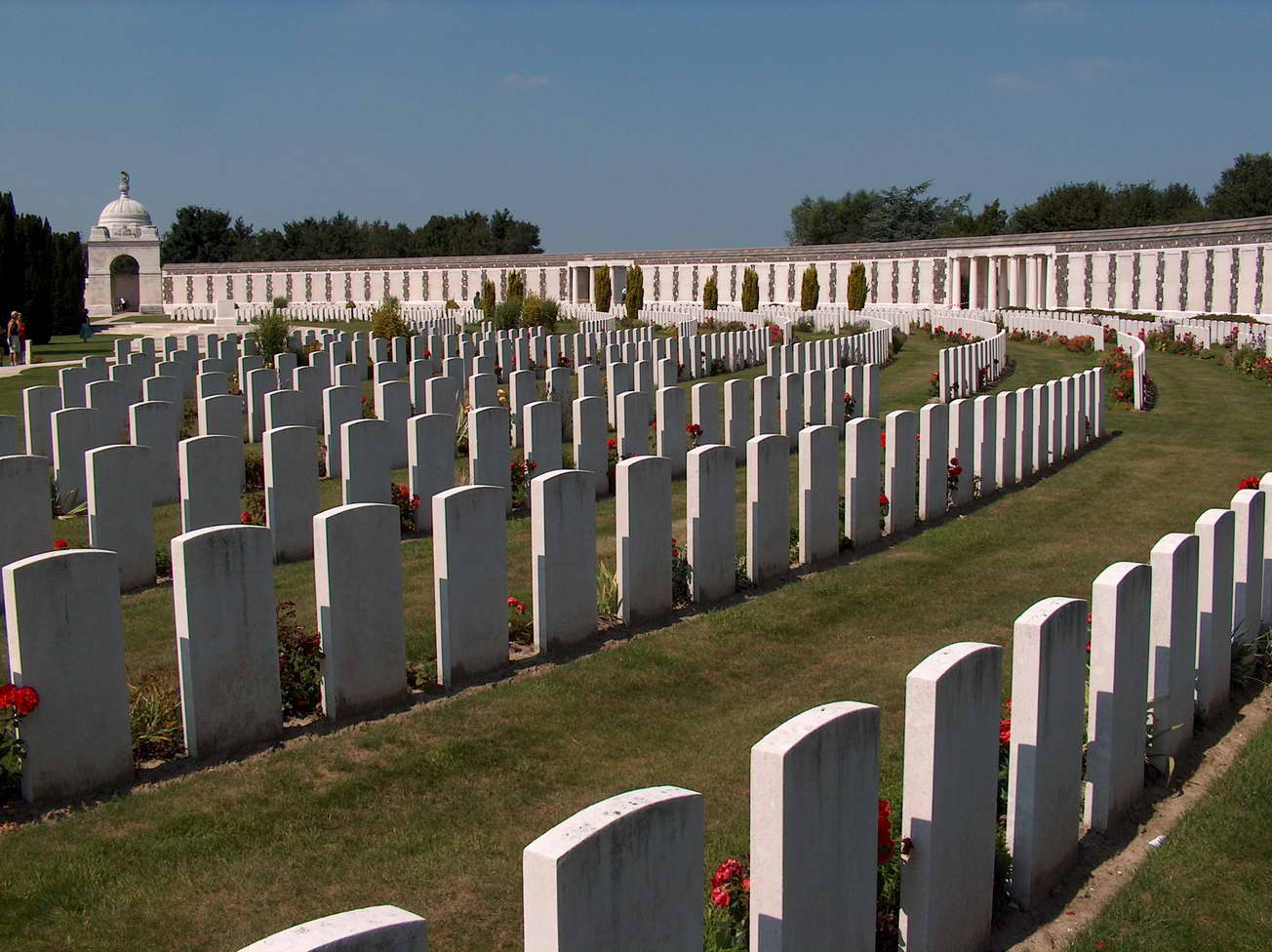 In Passendale, aan de Tynecotstraat en de Vijfwegestraat, vinden we het Tyne Cot Cemetery. Dit is het grootste van alle Britse soldatenkerkhoven.